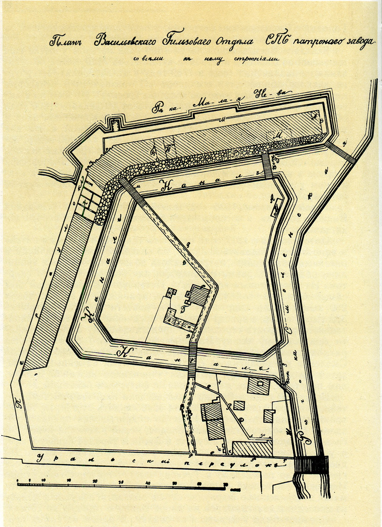 План Васильевского Гильзового отдела Санкт-Петербургского патронного завода, 1869 г., Российская империя.